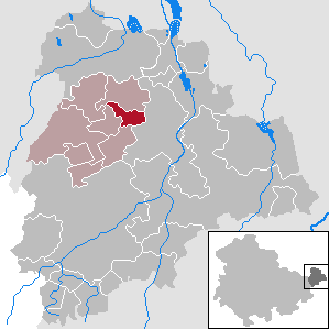 Lödla in Thuringia - District Altenburger Land